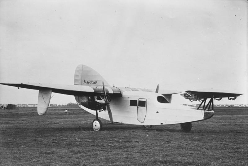 Die Focke-Wulff-Ente in Berlin! Das eigenartige Flugzeug der Contrukteure Focke und Wulff weilt augenblicklich auf dem Centralflughafen in Berlin, um während mehrerer Tage Rundflüge über die Reichshauptstadt auszuführen.